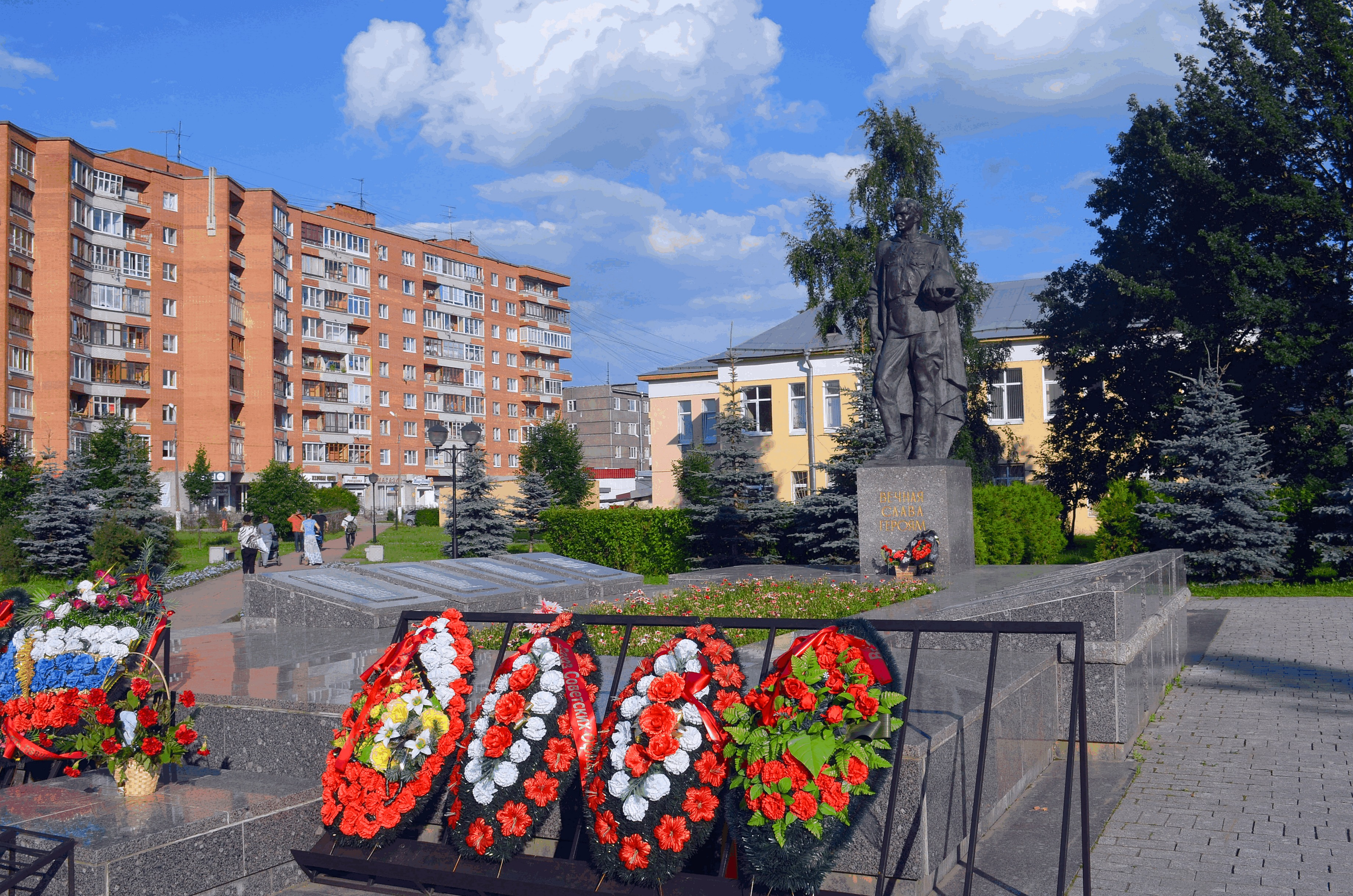 Братская могила советских воинов, погибших в борьбе с фашистами: проспект Ленина / улица Советская, сквер, Тосно, Тосненский район, Ленинградская область